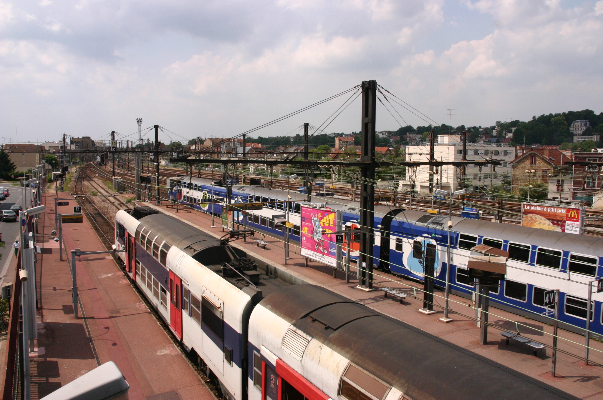 Gare de Juvisy, Juvisy-sur-Orge , département l'Essonne, France